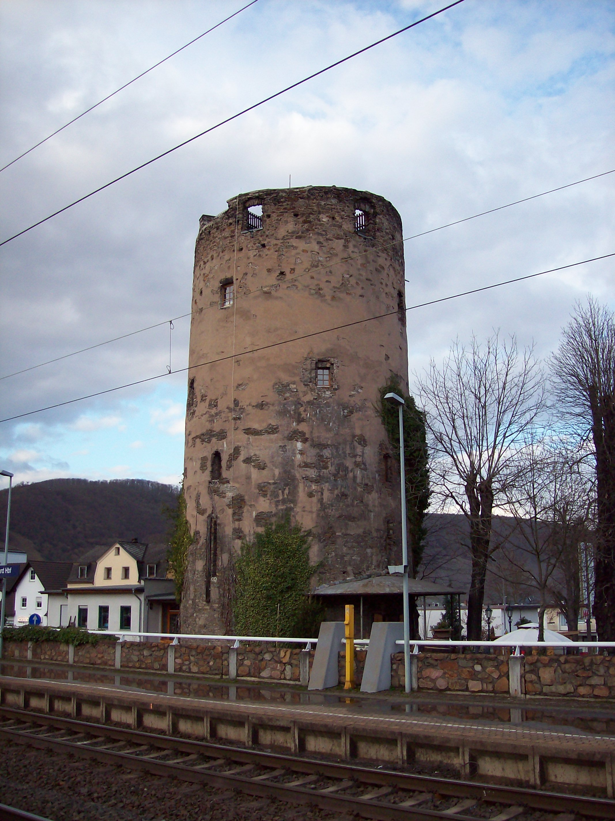 Der Säuerlingsturm, Teil der ehemaligen mittelalterlichen Stadtbefestigung von Boppard